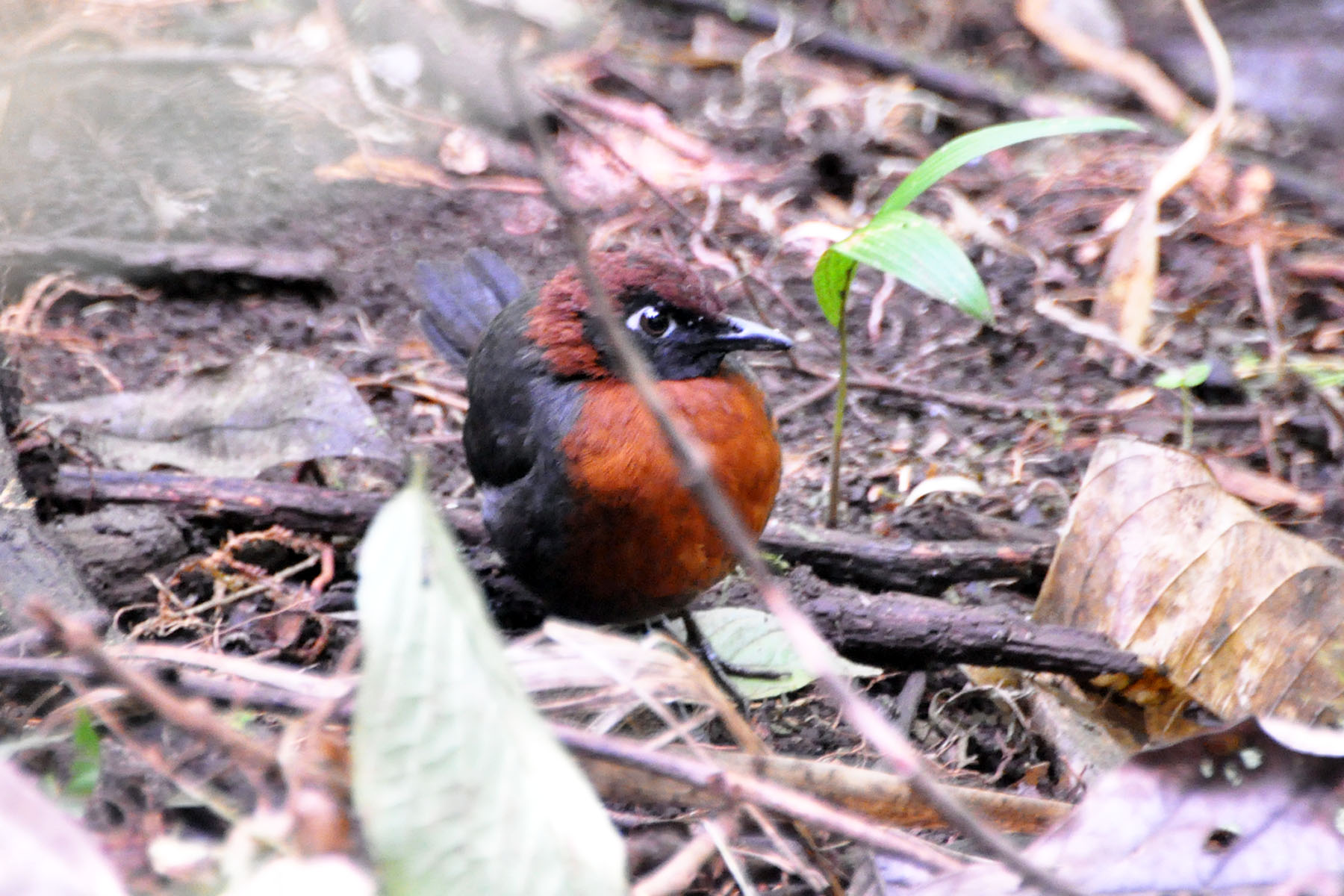 Formicaruis rufipectus carrikeri 16-sep-10 Angel Paz, Ecuador